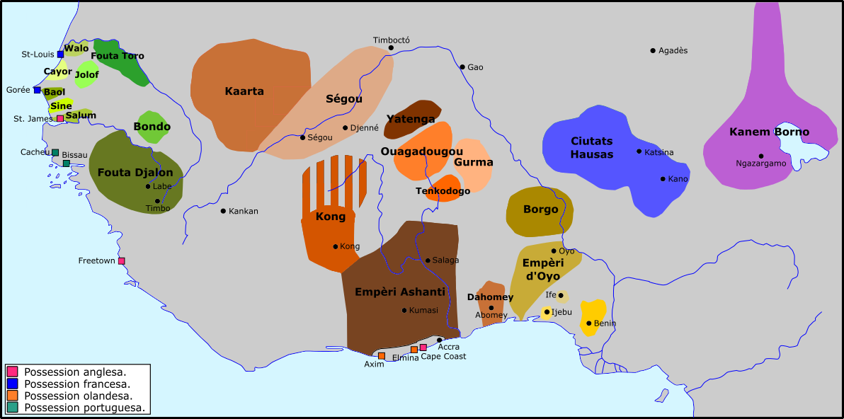 Africa de l'Oèst a la fin dau sègle XVIII.